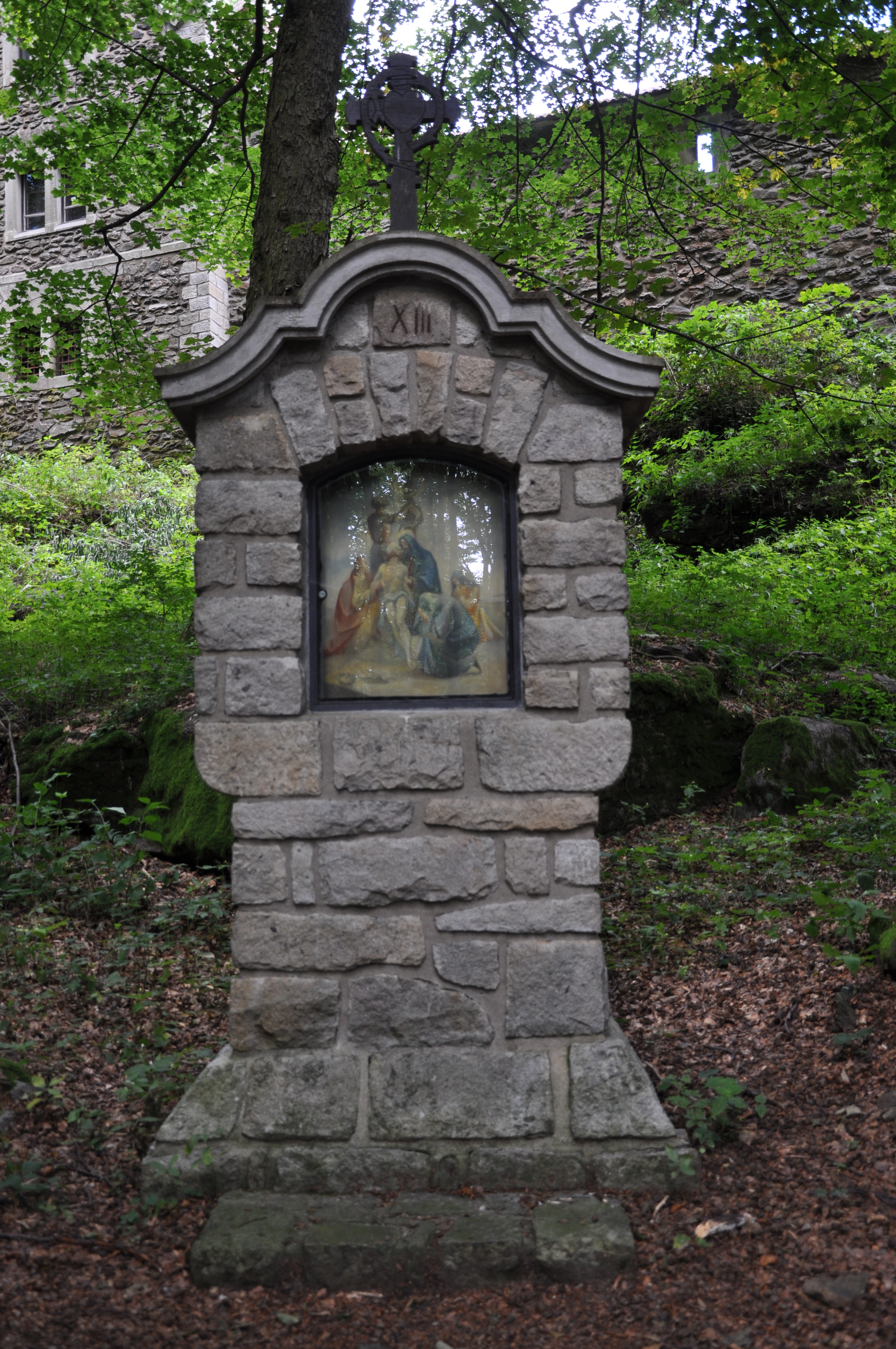 Křížová cesta č.XIII (Křemešník). Křemešník. Nový Rychnov. Okres Pelhřimov. Kraj Vysočina. Czech Republic.